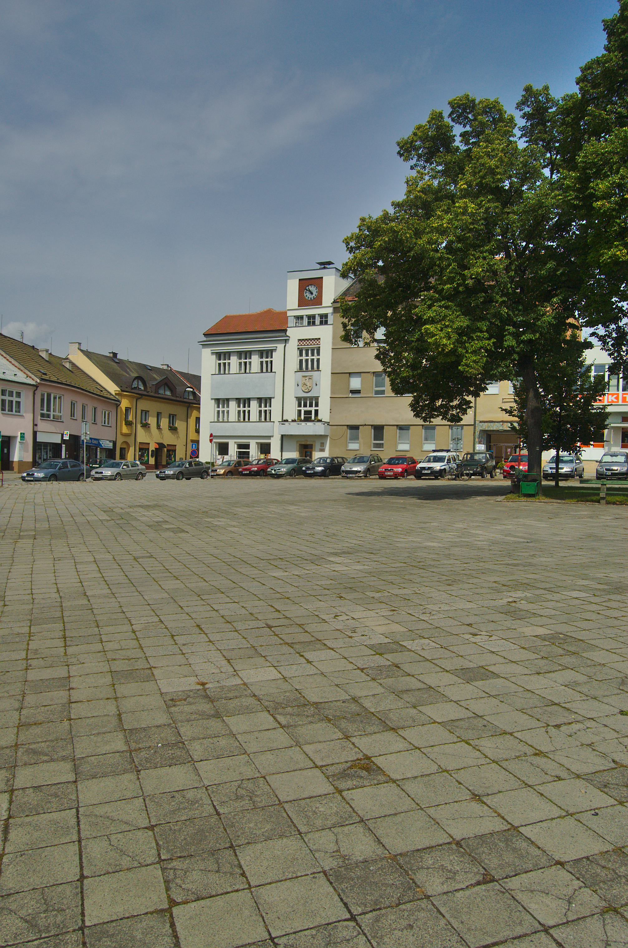 Radnice, Konice, okres Prostějov